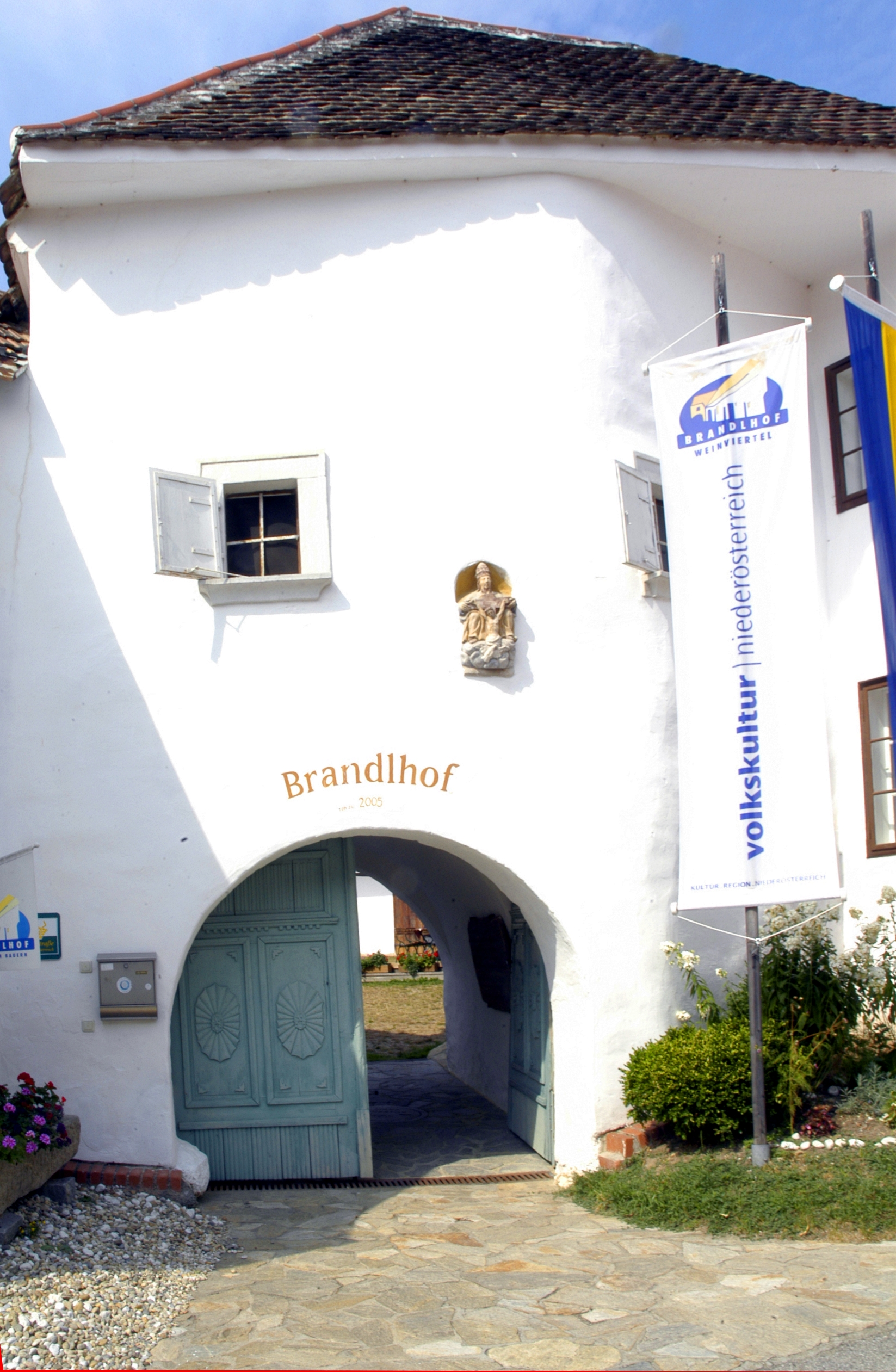 ehemaliger Meierhof in Radlbrunn Hoftor